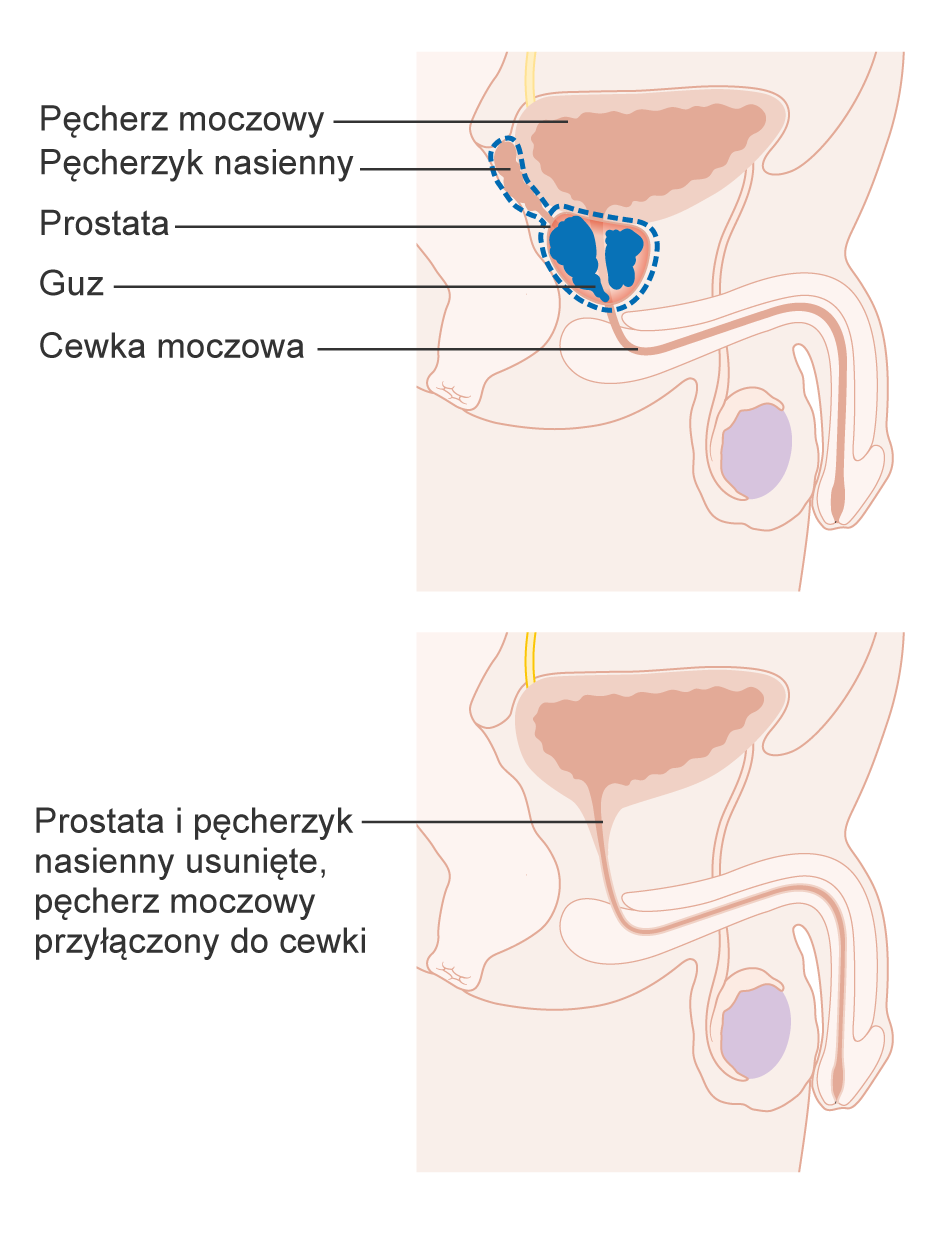 Zabieg usunięcia prostaty.